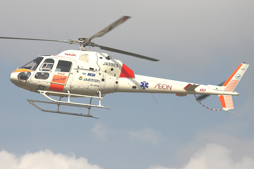 主に沖縄県本島北部に活動拠点を置く民間救急ヘリコプターMESH